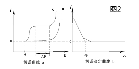 中文（中国大陆）: 安培滴定法图